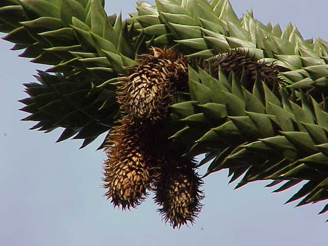 Species: Araucaria araucana Family: Araucariaceae Image No. 1